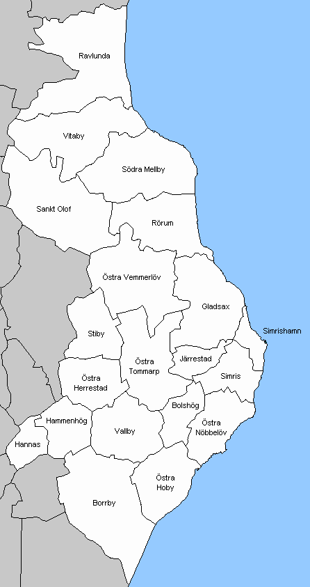 Socken in Simrishamn